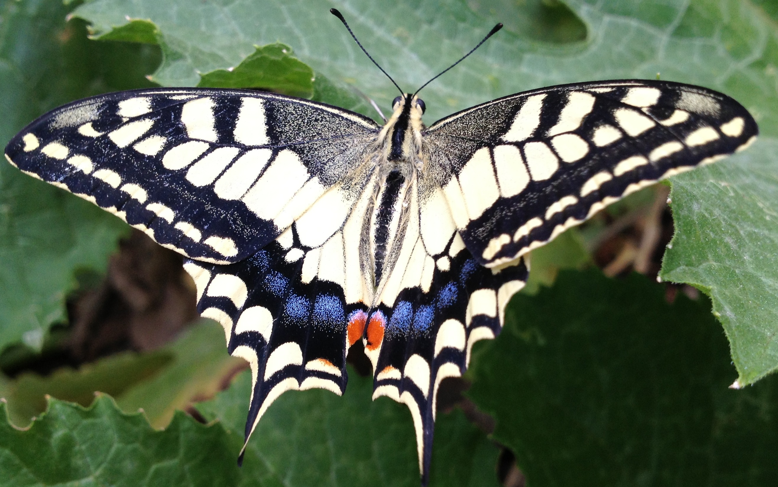 פרפר זנב סנונית נאה